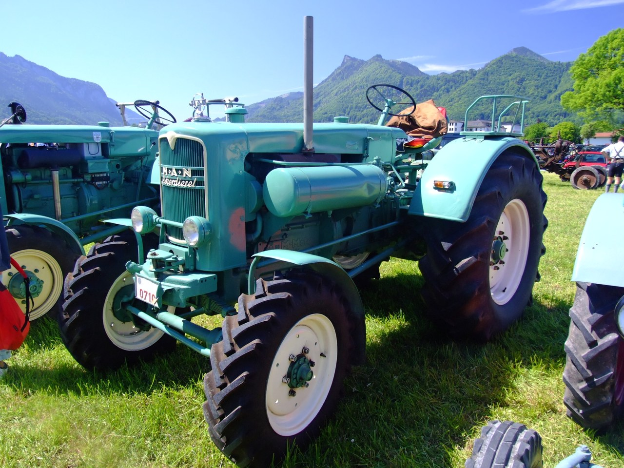 MAN 4R2 Ackerdiesel, Baujahr 1959, zul. Gesamtgewicht: 3600 kg, zul. Achslast vorne: 1800 kg, zul. Achslast hinten: 2400 kg